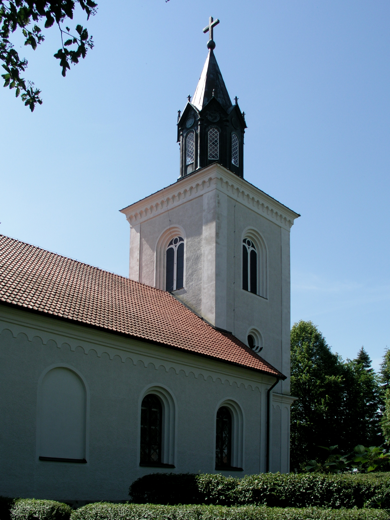 Ledbergs kyrka / Ledberg church. Tower.